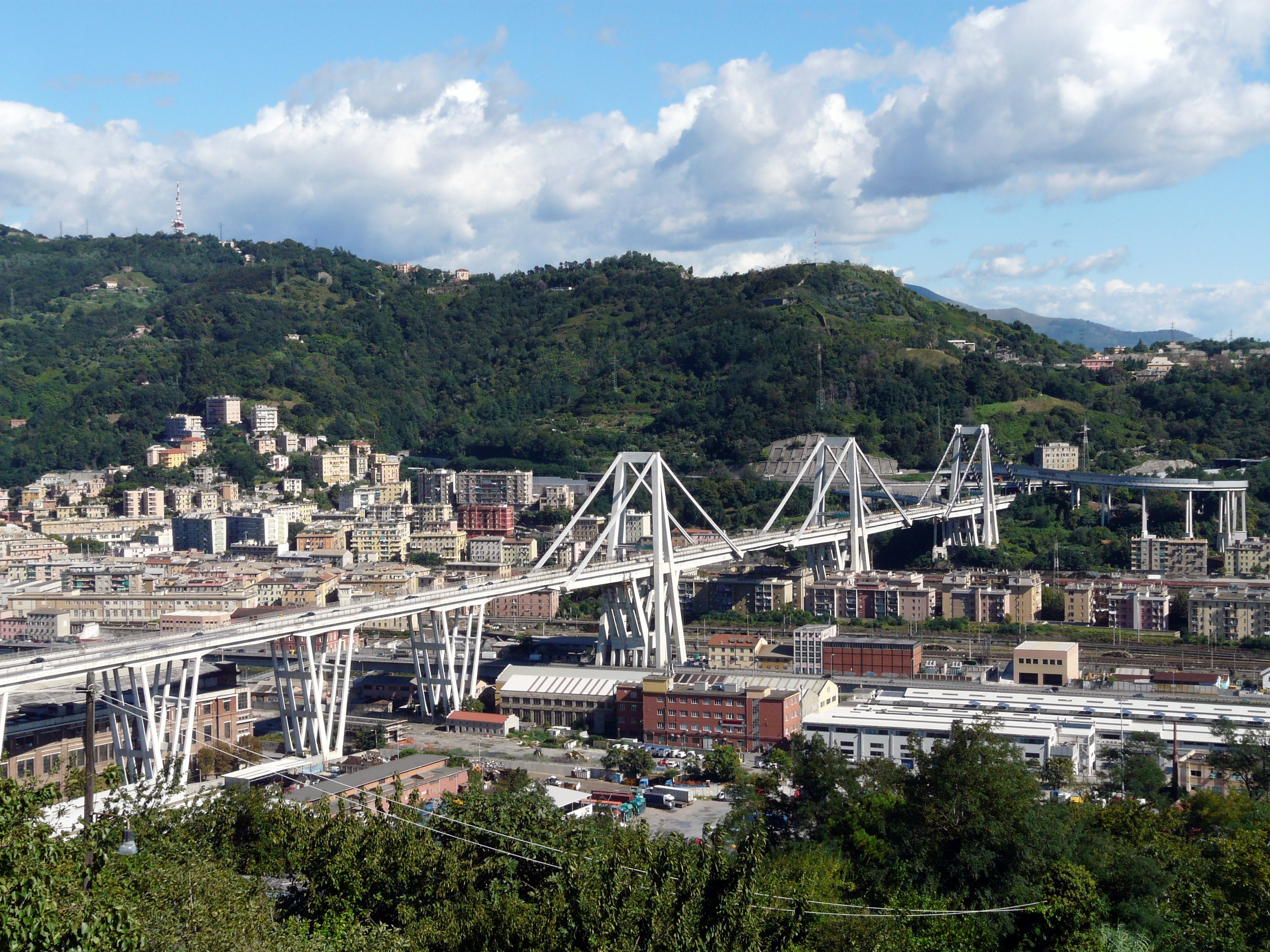 Panorama dal santuario di Nostra Signora Incoronata verso il ponte Morandi dell'autostrada A10, Coronata, Genova, Liguria, Italia